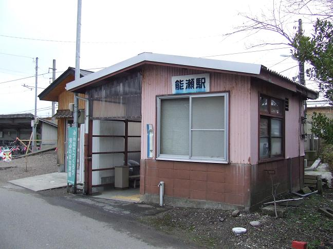 JR能瀬駅駅舎